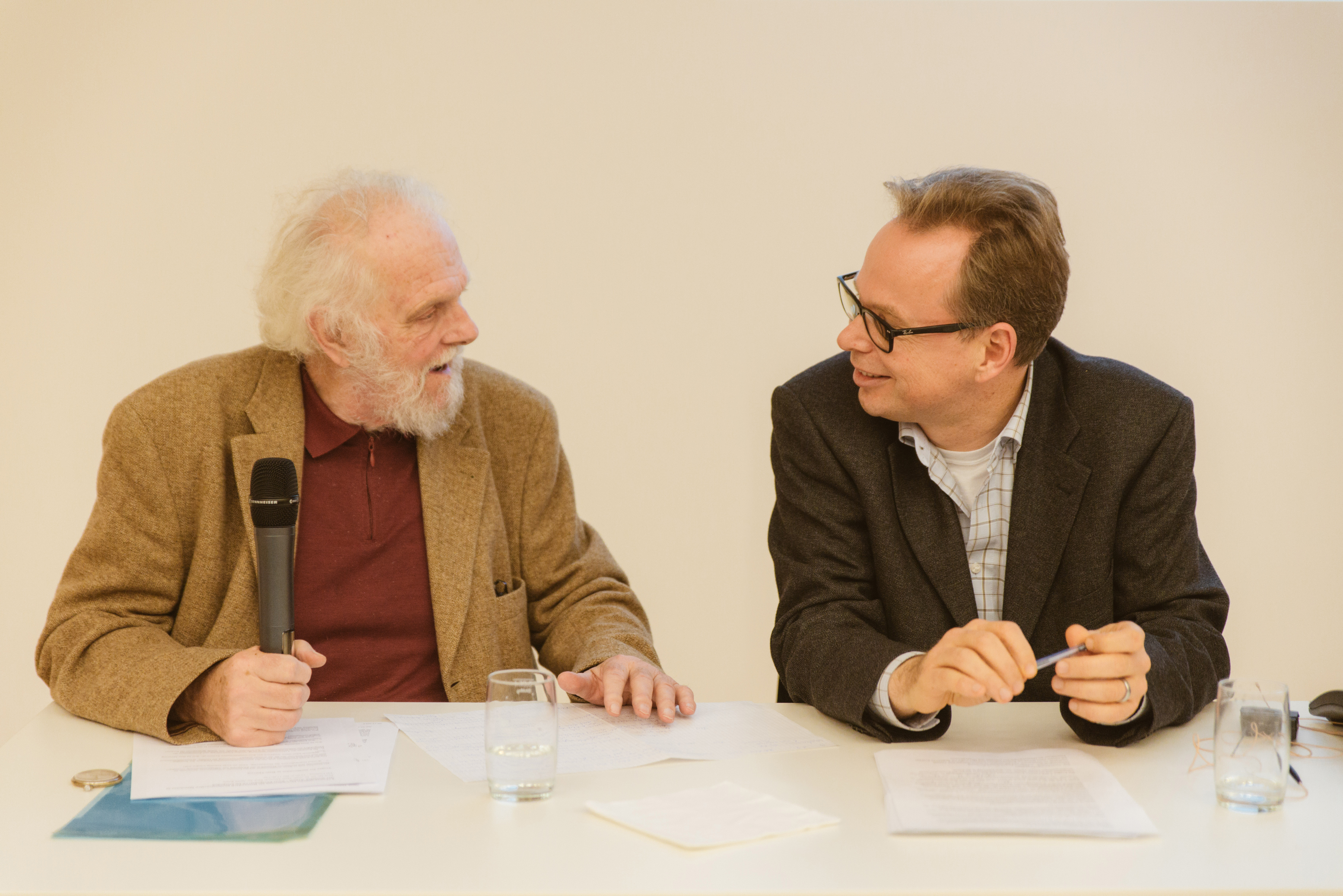 Hans Thiersch und Björn Kraus während einer gemeinsamen Veranstaltung zu Lebenswelt und Lebensweltorientierung in der Sozialen Arbeit